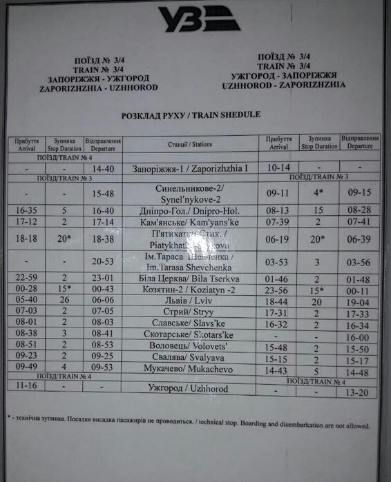 Розклад руху потяга "Нічний експрес" № 3/4 сполученням Запоріжжя - Ужгород на 2019 рік